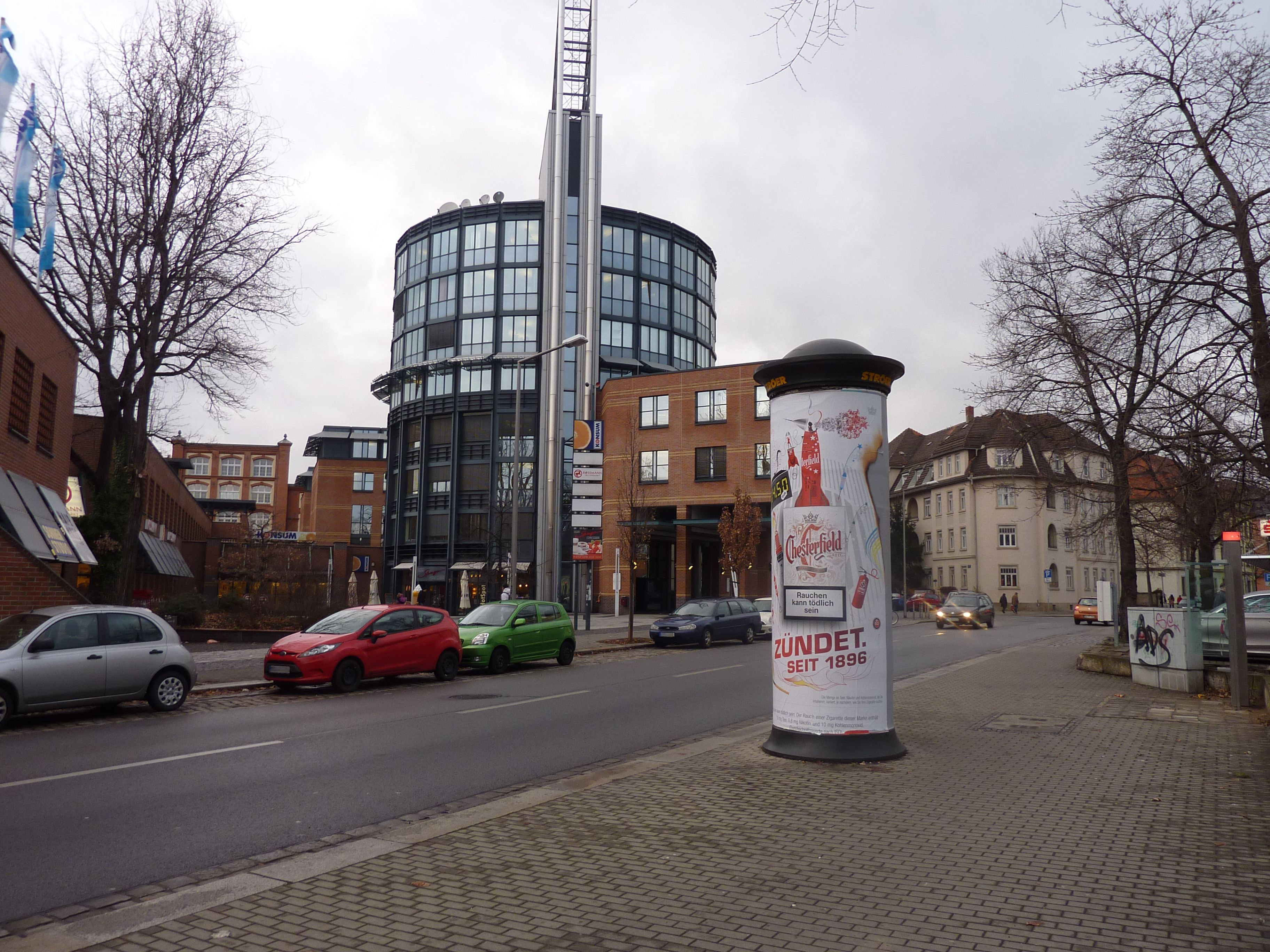 Bürogebäude an der Trachenberger Straße/Riesaer Straße